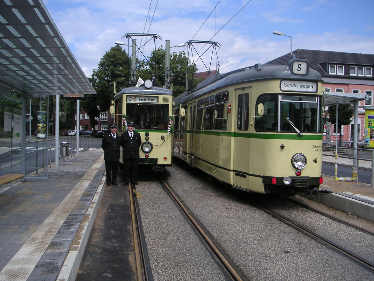 Beschreibung: Zwei Historische Wagen (Nummer 96 & 40) der BOGESTRA bei der Wiedereröffnung der Haltestelle Essener Str. im Gelsenkirchener Stadtteil Horst. Description: Two old trams (numbers 96 an 40) of the BOGESTRA. (Reopening of the stop Essener Straße in Gelsenkirchen) Quelle: Fotografiert am 27 Juni 2004 Fotograf: Marc Schuelper